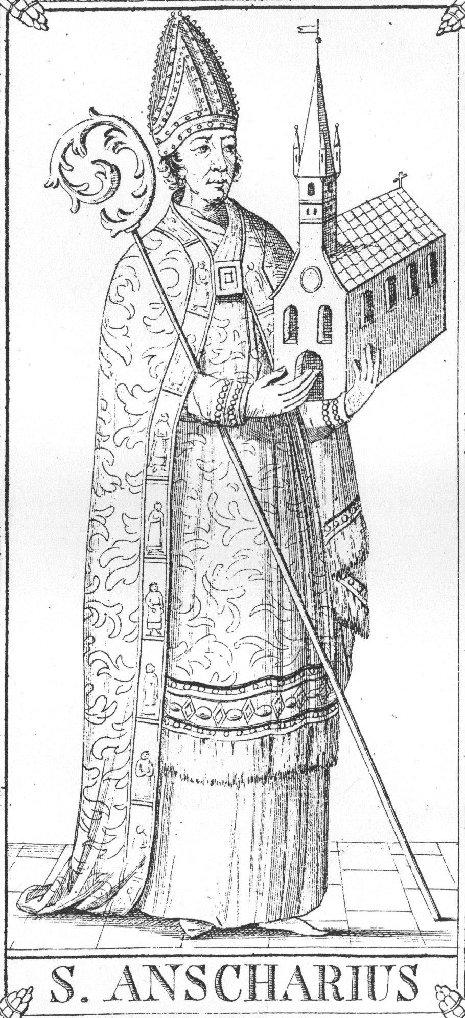 Hl. Ansgar : Umzeichnung eines Bild aus dem Mariendom (Hamburg) aus F.J.L. Meyer "Blick auf die Domkirche in hamburg", Hamburg 1806 Orginalbild heute in der St-Petri-Kirche Hamburg, eine Stifterfigur des Bildes Fehlt in der Umzeichnung